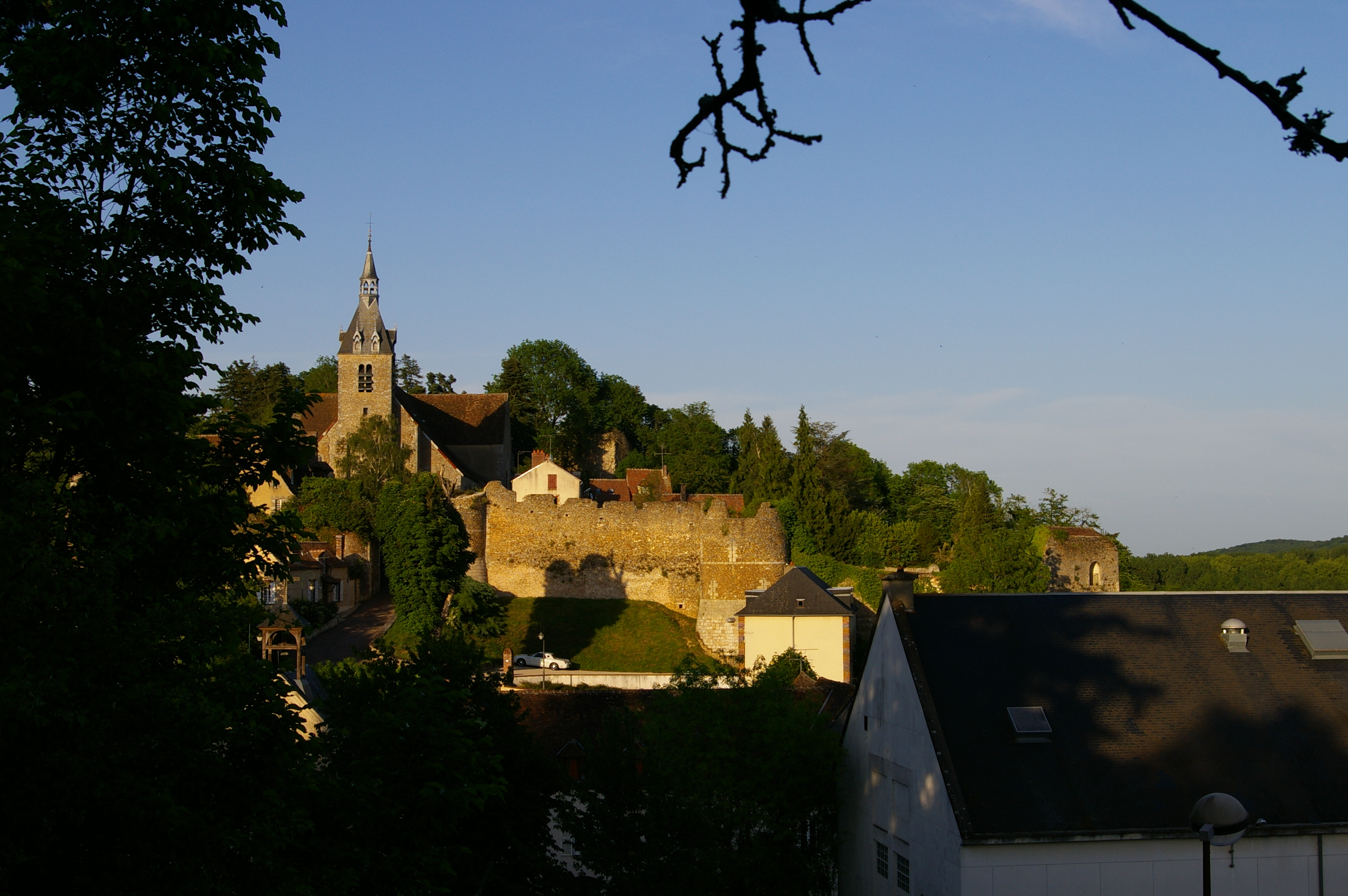 Face à nous, l'église Saint-Étienne de Château-Renard avec à ses pieds un pan de remparts, prolongés à droite par une tour ronde puis un autre pan de murailles recouvert de verdure. Terminant cette muraille à droite, une pièce rectangulaire et couverte de tuiles, appelée "tour Anquetil". En bas à droite, le bâtiment de la mairie (pignon nord). Entre la tour Anquetil et la mairie, l'ancienne école primaire - encore en fonction dans les années 1950. Vue depuis les anciennes champignonnières sur la route de Saint-Firmin-des-Bois.